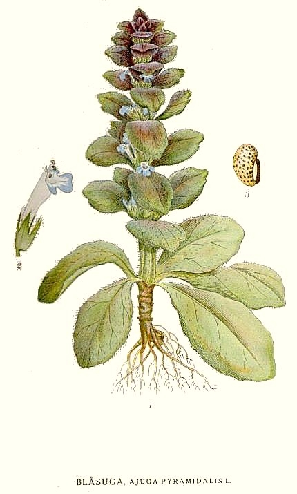 Original Description Blåsuga, Ajuga pyramidalis L.